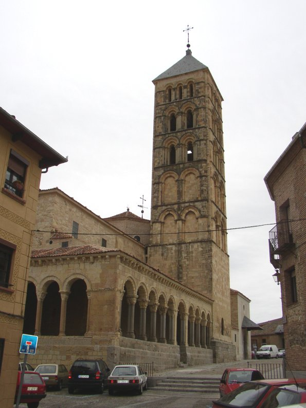 Segovia. (Castilla-León. España) Iglesia de San Estebán Siglo XIII. Fotografía realizada el 22 abril de 2003 por el autor.User:Pelayo2.